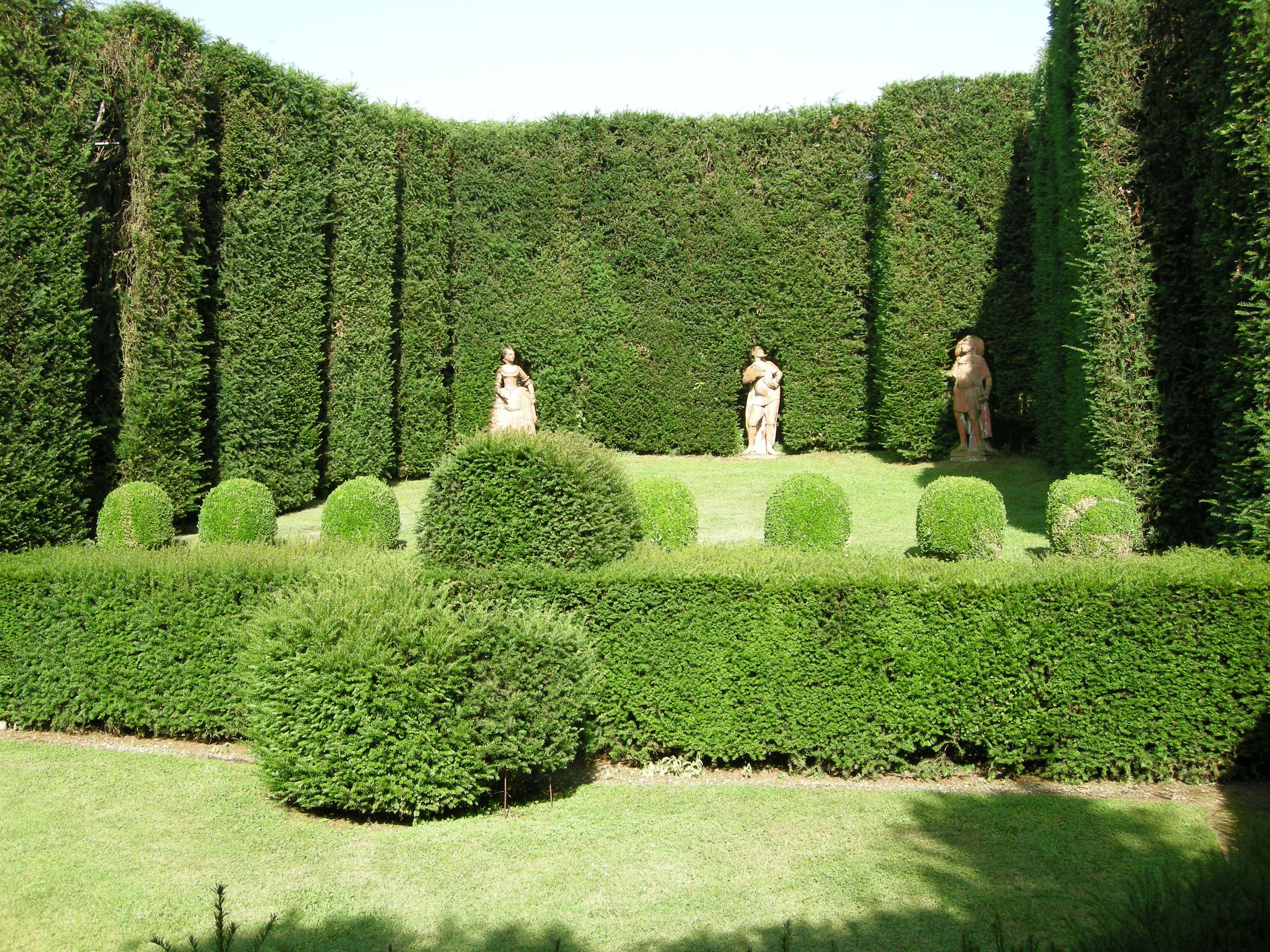 Teatro di verzura — Villa Reale di Marlia — Tuscany.